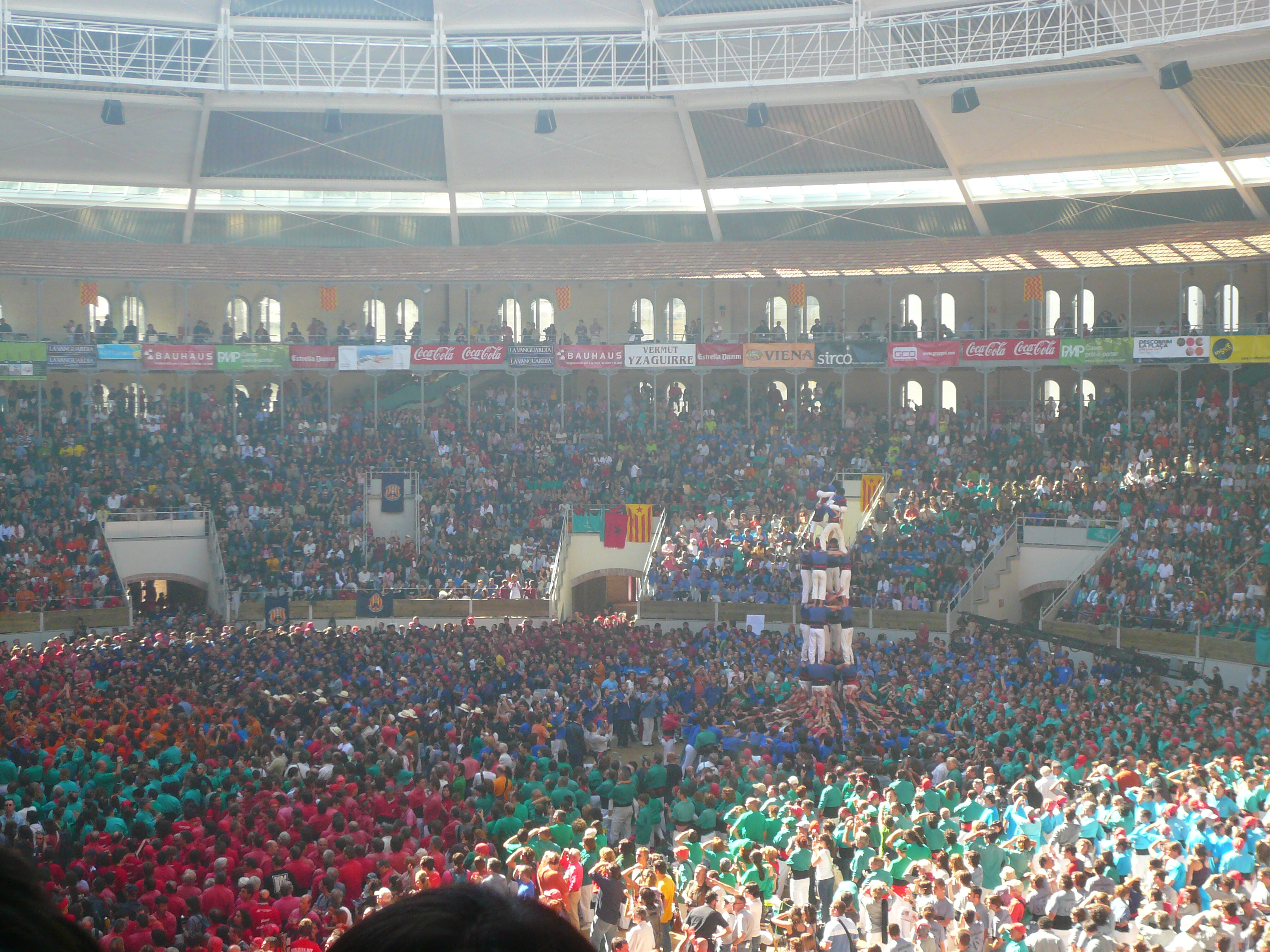 Concurs de Castells 2008, a la plaça de Toros de Tarragona Object location41° 06′ 51.64″ N, 1° 14′ 43.03″ E